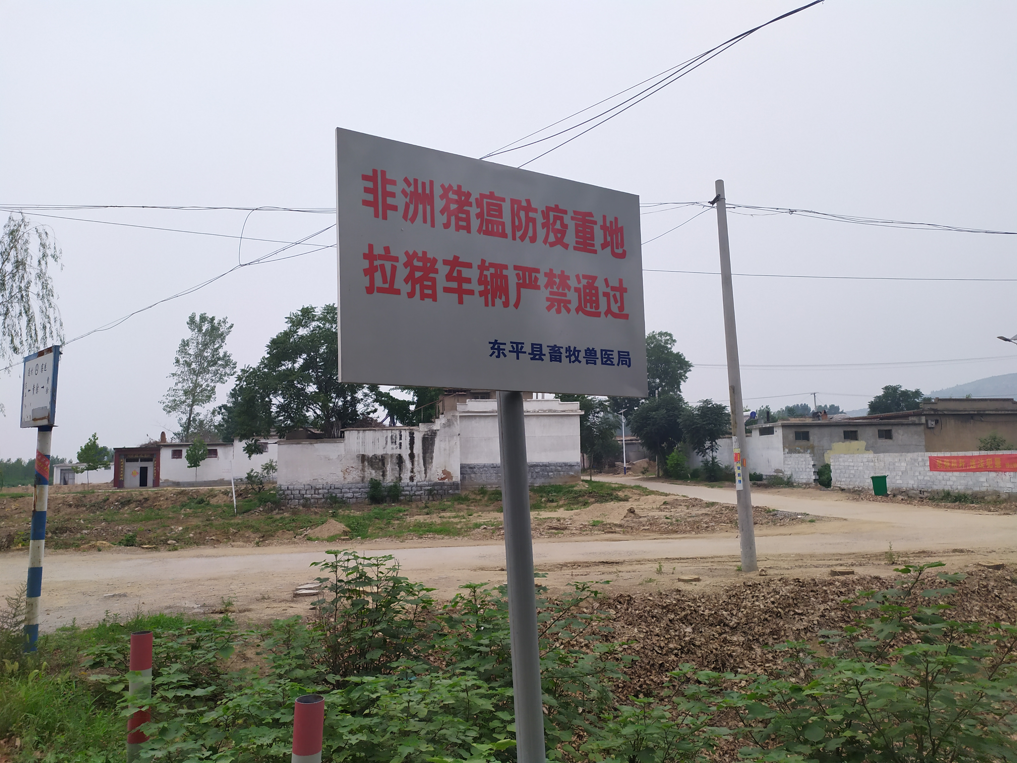 中文（中国大陆）: 山东省东平县黄徐庄村一处告示，其上写有“非洲猪瘟防疫重地，拉猪车辆严禁通过”